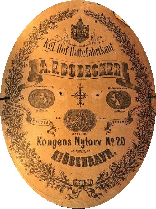 A.F. Bodeckers hattetikett Köpenhamn